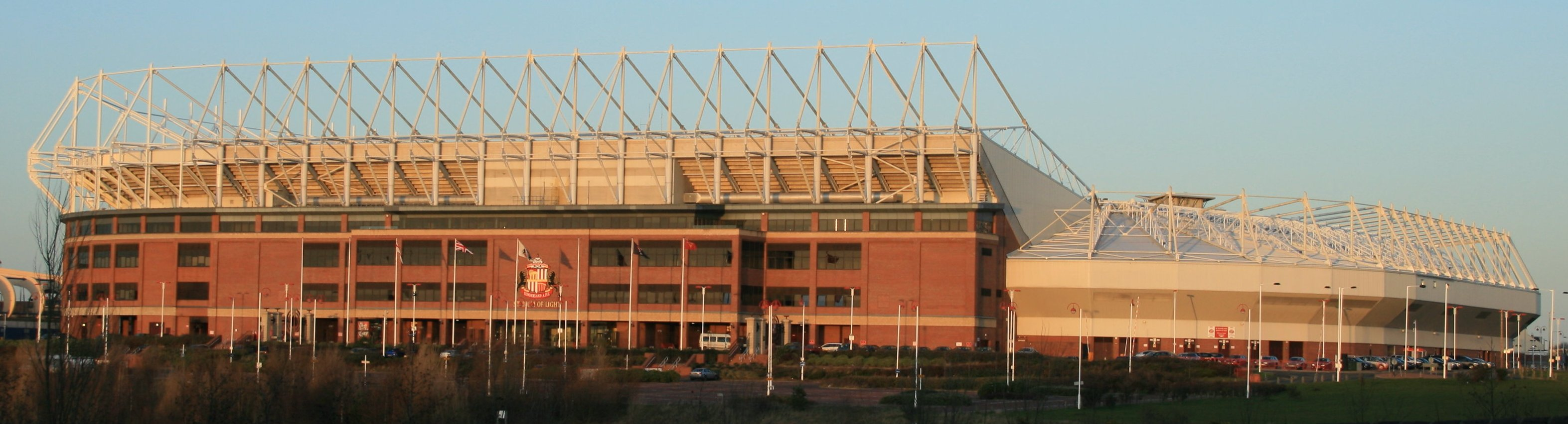 Sunderland Stadium of Light, taken from Deptford, at sunset.